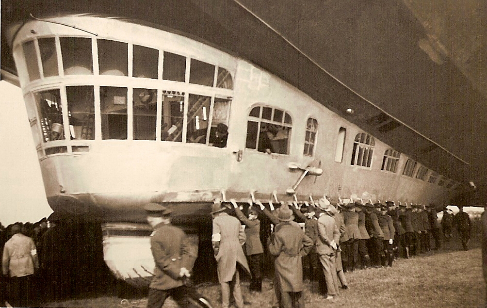 People holding down Zeppelin LZ 127